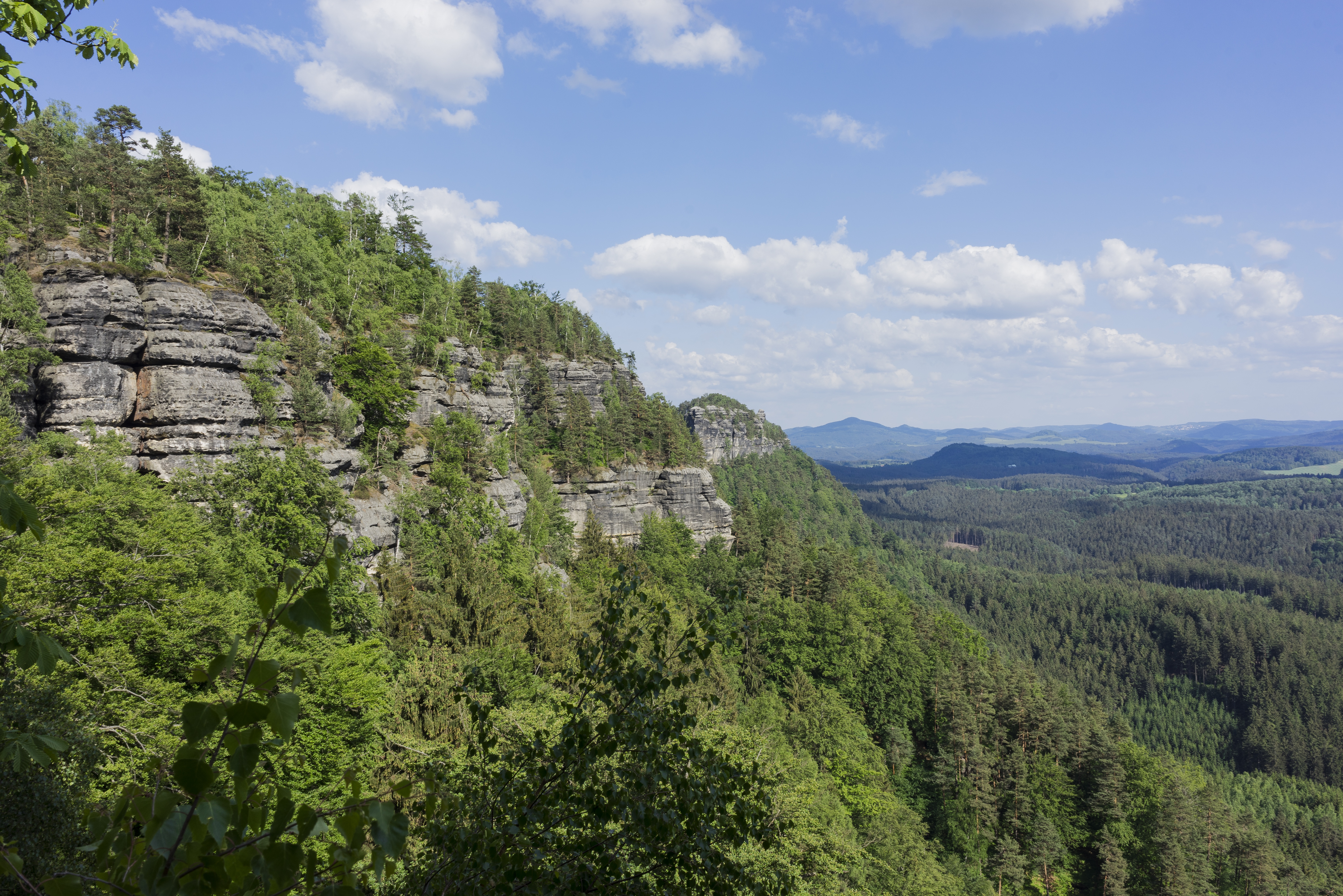 Nationalpark Böhmische Schweiz